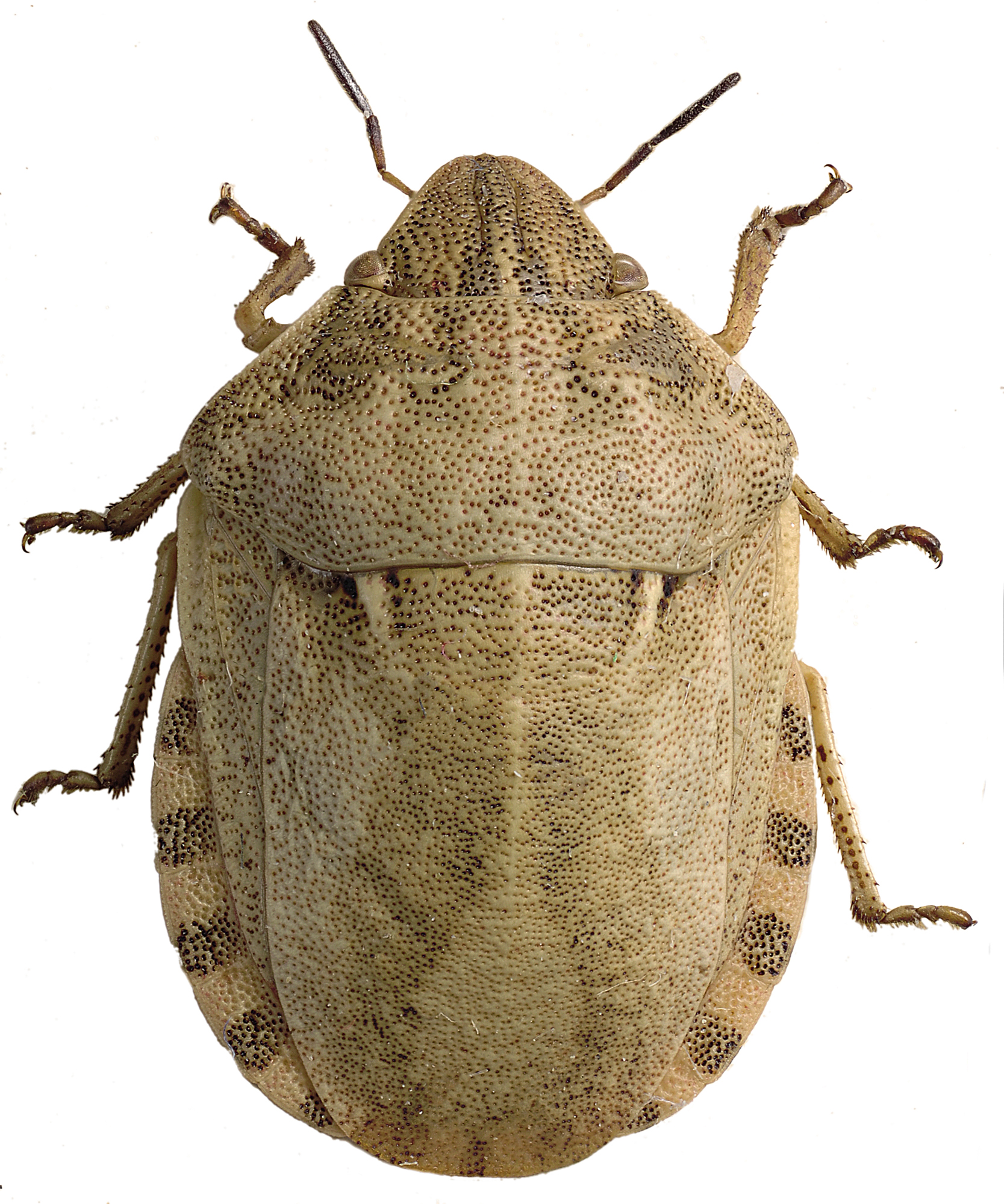 Eurygaster maura